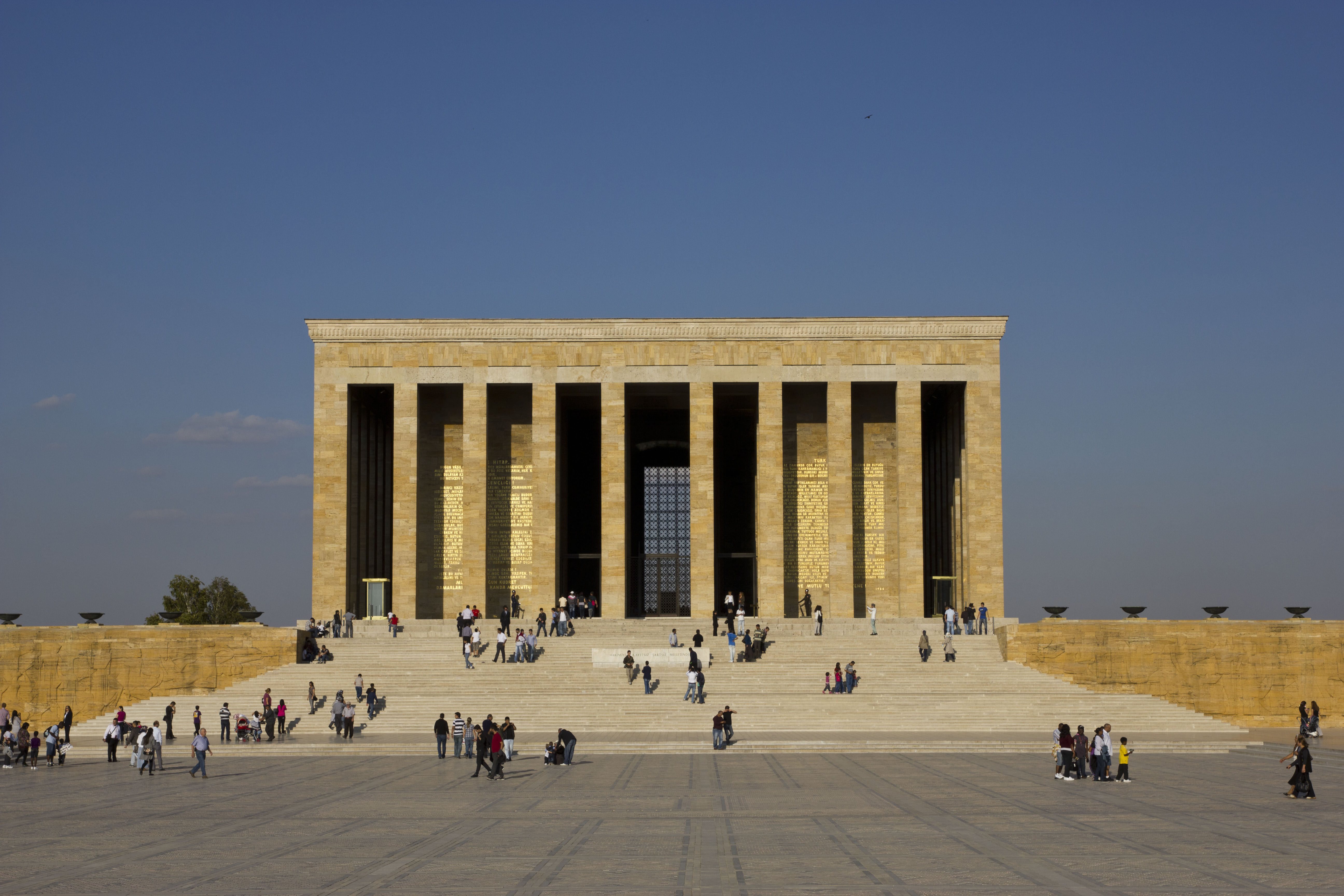 Anıtkabir